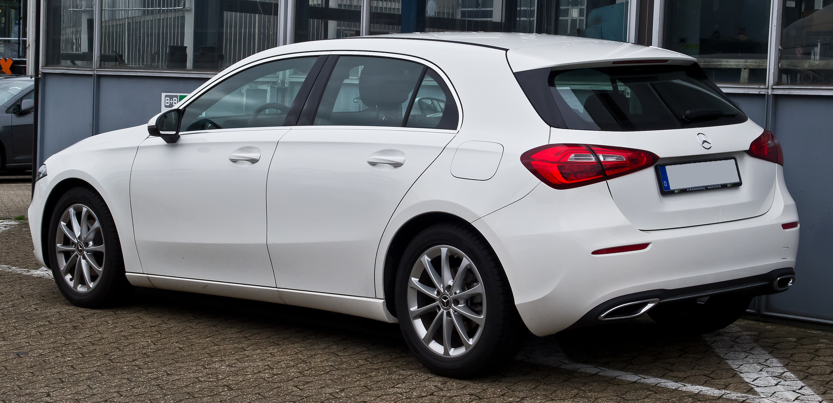 Mercedes-Benz A 180 Progressive (W 177)